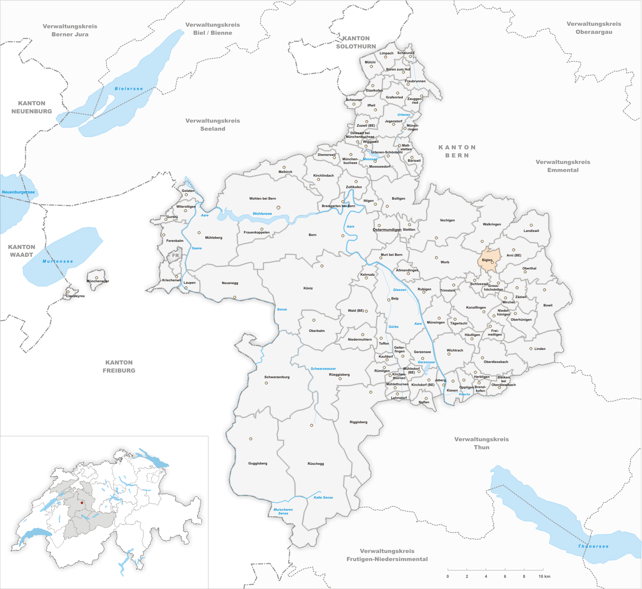 Municipality Biglen